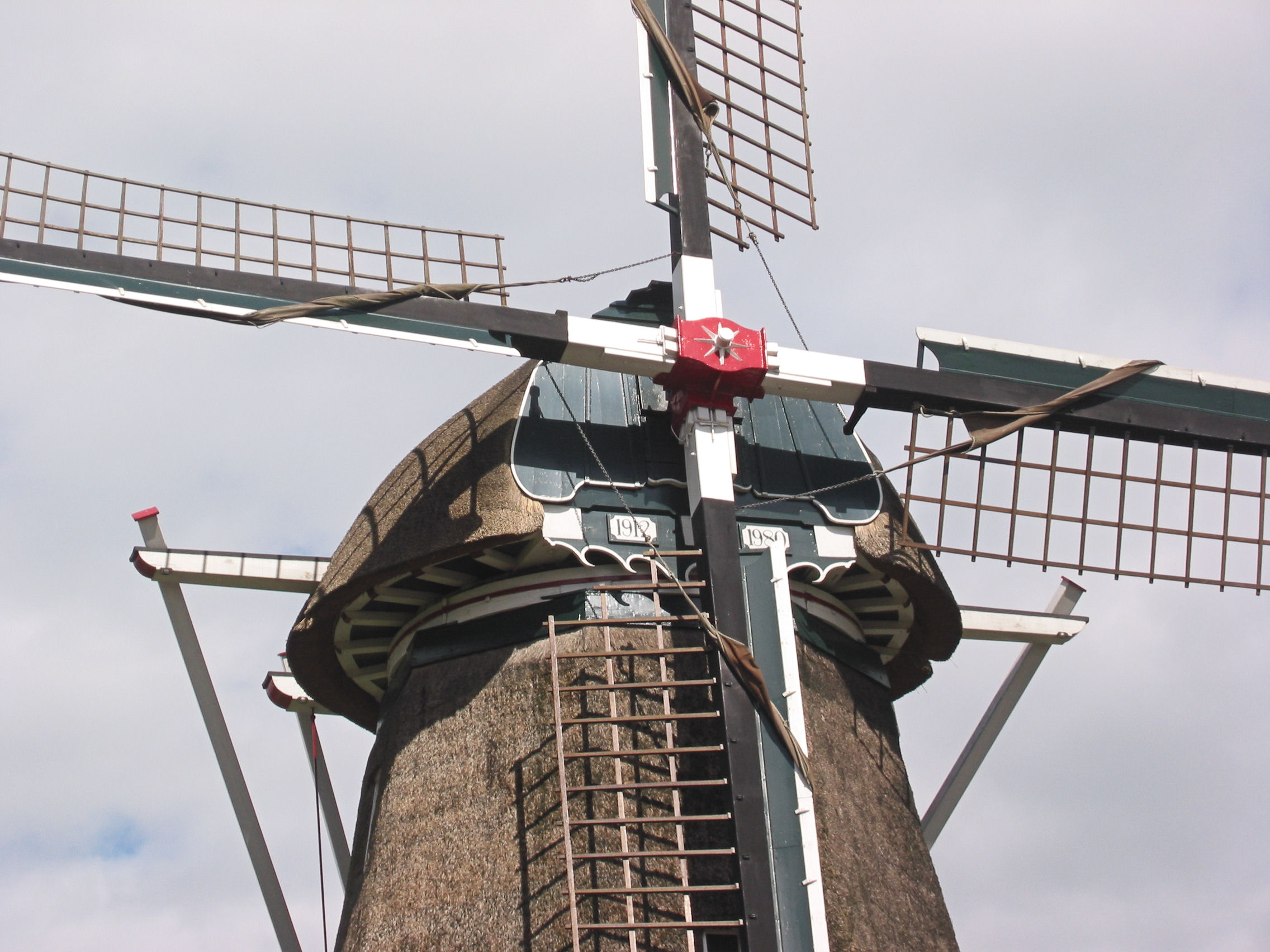 Wiekenkruis Walderveensemolen in Walderveen, Gelderland, the Netherlands